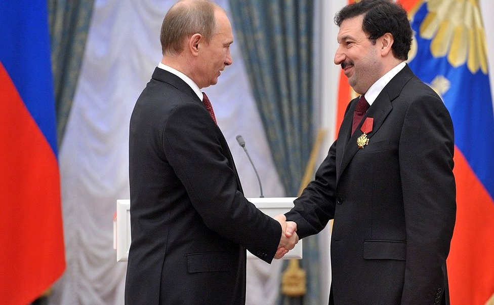 Церемония вручения государственных наград РФ. Орденом «За заслуги перед Отечеством» IV степени награждён ректор Российской академии народного хозяйства и государственной службы при Президенте Российской Федерации Владимир Мау